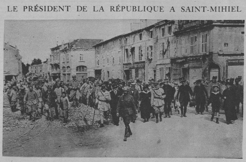 Le Pays De France n°_206, page_8 montre_St-Mihiel visité par Poincaré, les dégats son visibles sur la rue et les bâtiments.